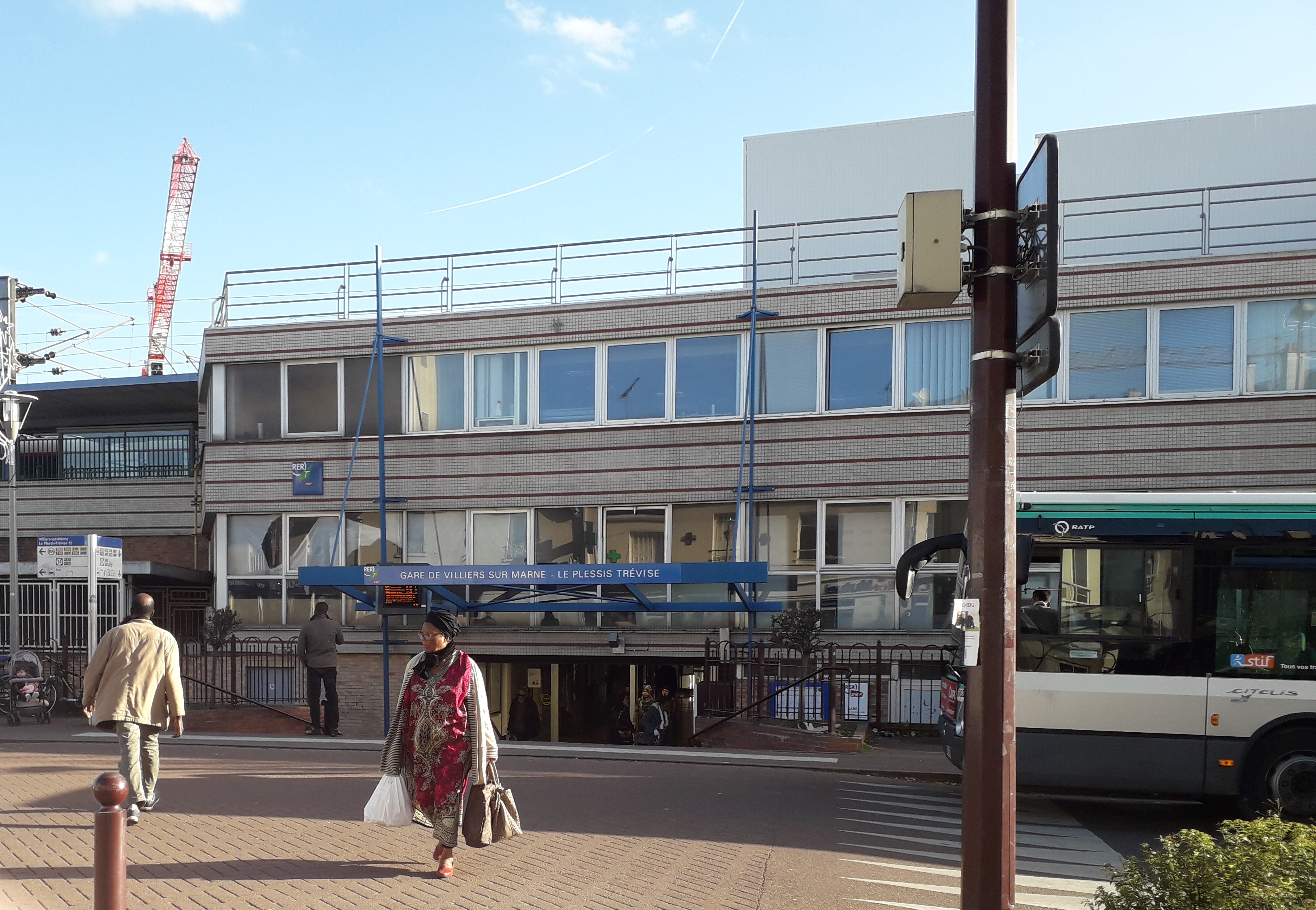 Vue rapprochée de la gare du RER E "Villiers-sur-Marne - Le Plessis-Trévise" vue depuis la rue du Chemin de fer, à Villiers-sur-Marne, dans le Val-de-Marne, en France.